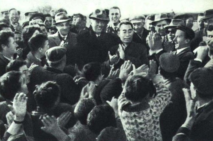 1964-03 1963年 中国访问阿尔巴尼亚 周恩来与霍查